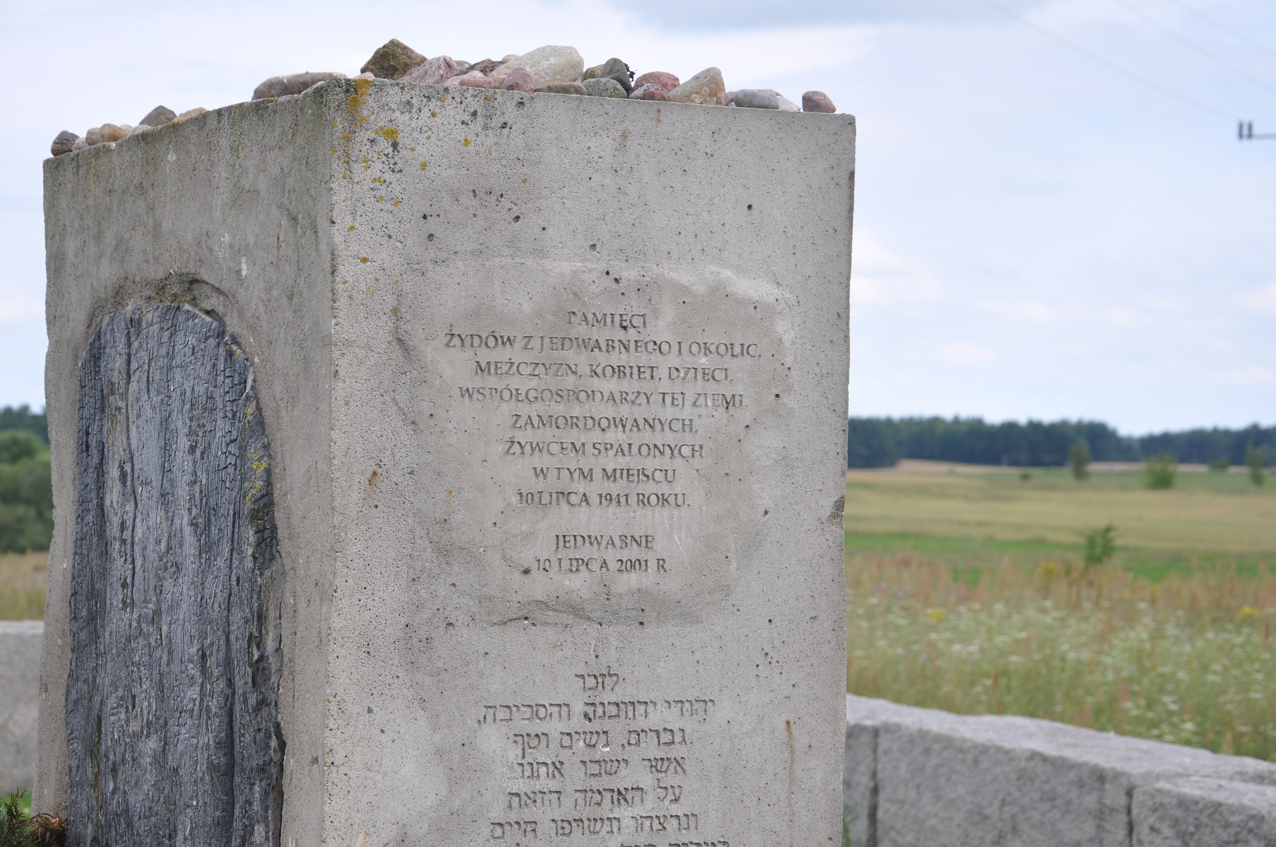 Mogiła-pomnik, na cmentarzu żydowskim, 1941 Jedwabne